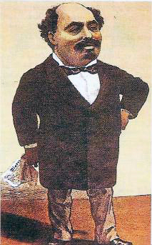 Caricatura do jornalista e tipógrafo português Eduardo Coelho (1835—1889)